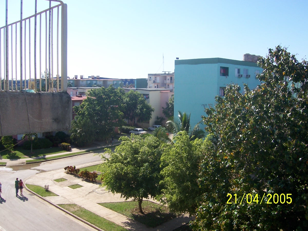 Vista desde un edificio de las residencias estudiantiles